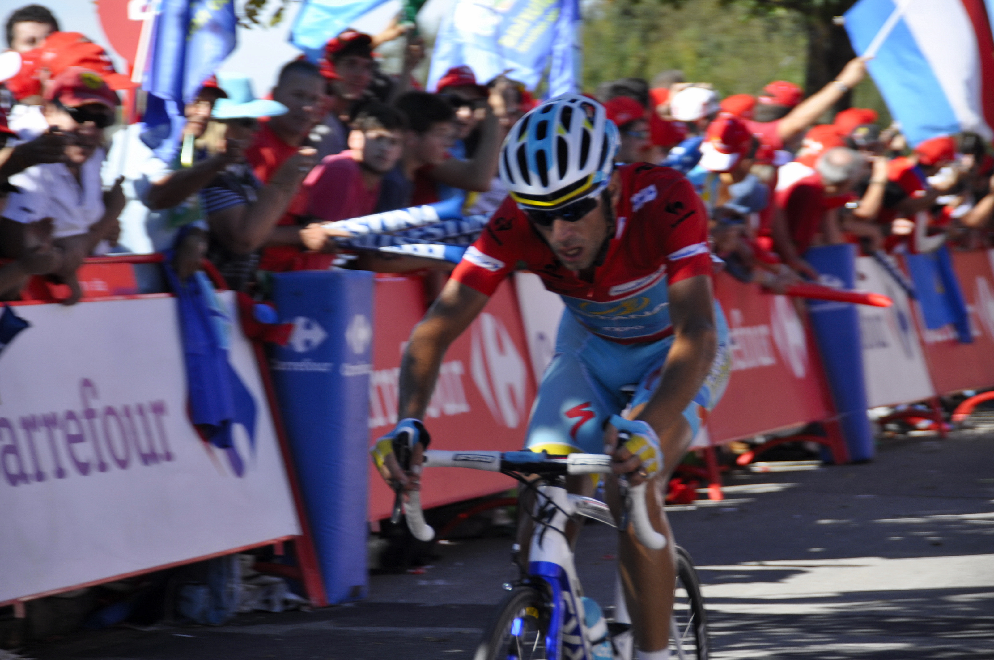 Vincenzo Nibali (Astana) con el maillót rojo de lider llegando el 9º a la meta del Naranco.